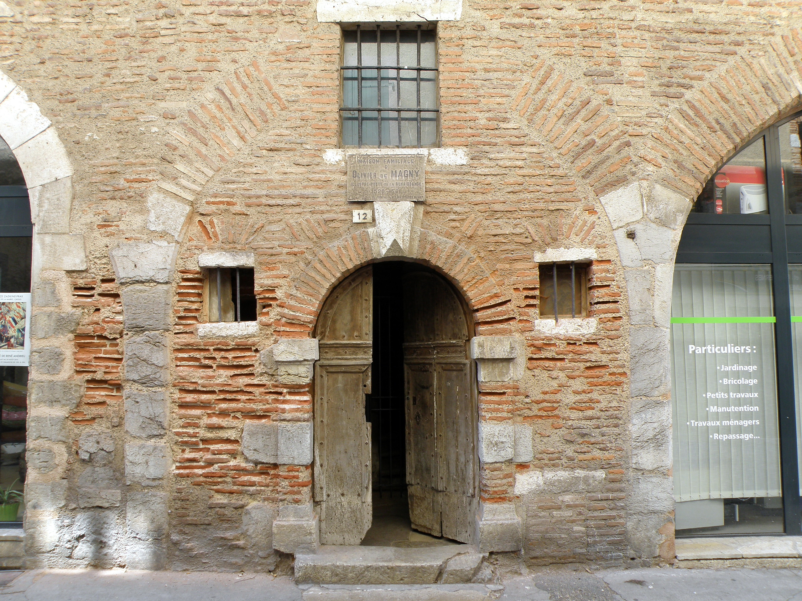 Cahors (Lot, France). Rue Clément-Marot, maison natale d'Olivier de Magny.